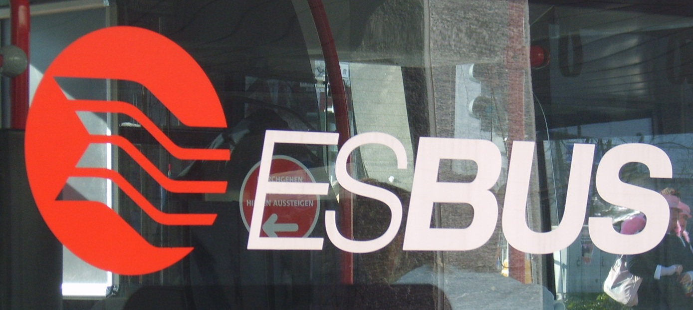 ESBUS-Logo auf einem ESBUS-Bus in Eschweiler